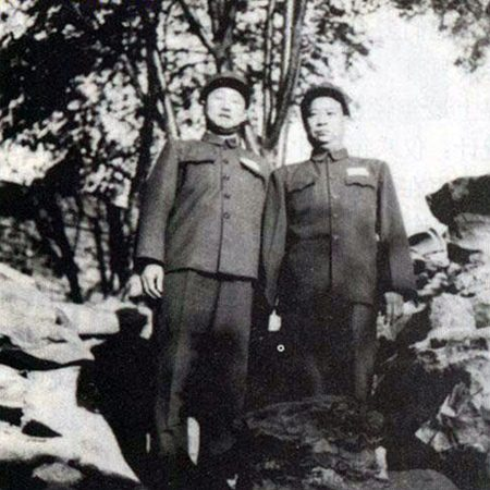 1950年代彭绍辉与贺炳炎两位独臂上将合影